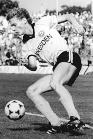 Title: Dynamo Dresden - Stahl Brandenburg 3:1 Factual corrections and alternative descriptions are encouraged separately from the original description. Additionally errors can be reported at this page to inform the Bundesarchiv. Original historic description: ADN-ZB-Häßler- -3.9.88-tre-Dresden-Fußball-Oberliga- Dynamo Dresden - Stahl Brandenburg 3:1- Uwe Jahnig (Dresden-rechts) sorgte für viel Druck aus dem Mittelfeld, hier im Zweikampf mit Jens Pahlke. 20 000 Zuschauer erlebten eine klaren Sieg der Dynamos.